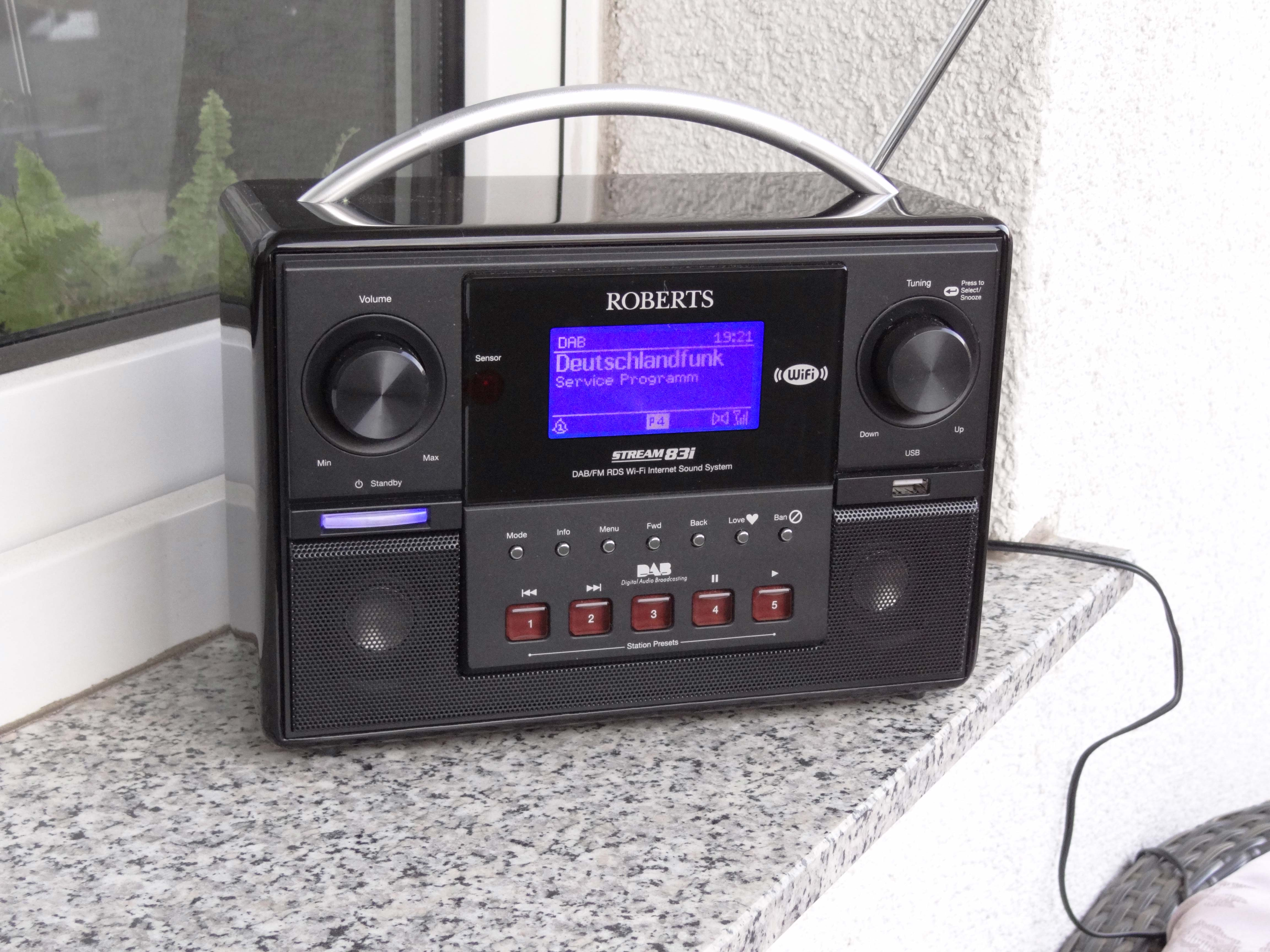 Roberts Tischempfänger für UKW, DAB+ und WiFi